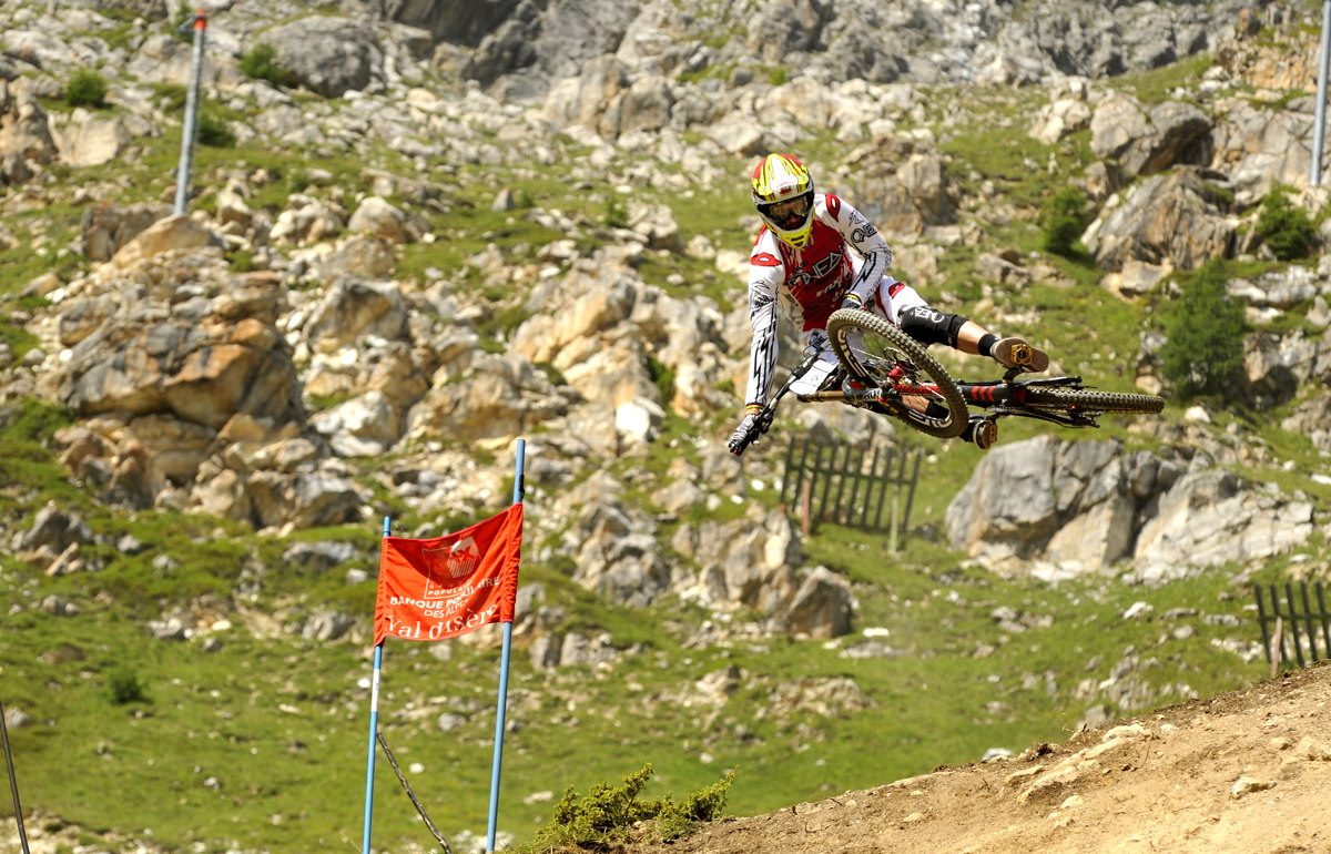 Greg Minnaar pendant la Coupe du Monde 2012 à Val d'Isère France